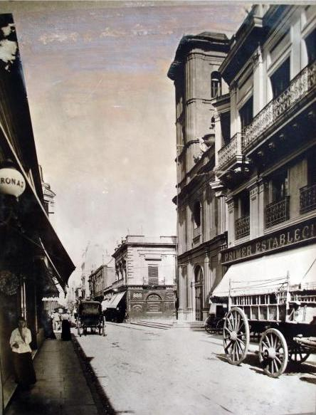 Vista de la calle Piedad (hoy Bartolomé Mitre) desde Suipacha hacia el este. Se destaca hacia la derecha la Iglesia de San Miguel Arcángel con su única torre.